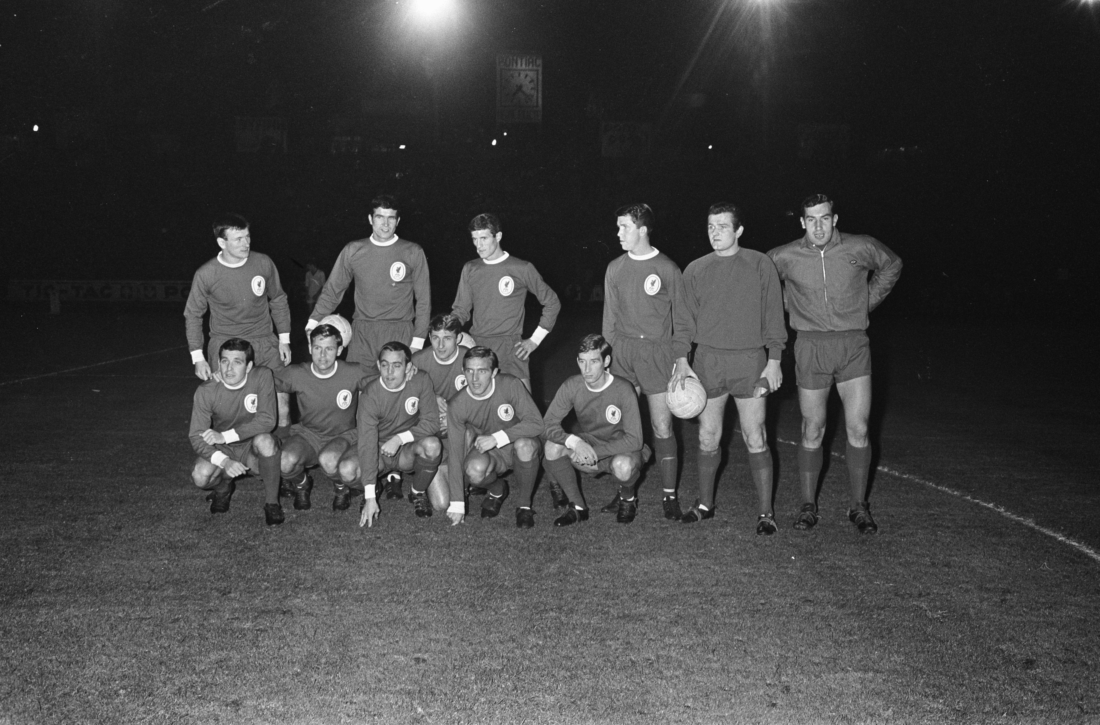 Collectie / Archief : Fotocollectie Anefo Reportage / Serie : Voetbalwedstrijd in de 1e ronde van de Europacup. Liverpool - Petrolul Ploie beslissingswedstrijd te Brussel: 2-0 Beschrijving : Elftal van Liverpool Datum : 19 oktober 1966 Locatie : België, Brussel Trefwoorden : groepsportretten, sport, voetbal Instellingsnaam : Europacup Fotograaf : Fotograaf Onbekend / Anefo Auteursrechthebbende : Nationaal Archief Materiaalsoort : Negatief (zwart/wit) Nummer archiefinventaris : bekijk toegang 2.24.01.05 Bestanddeelnummer : 919-7002